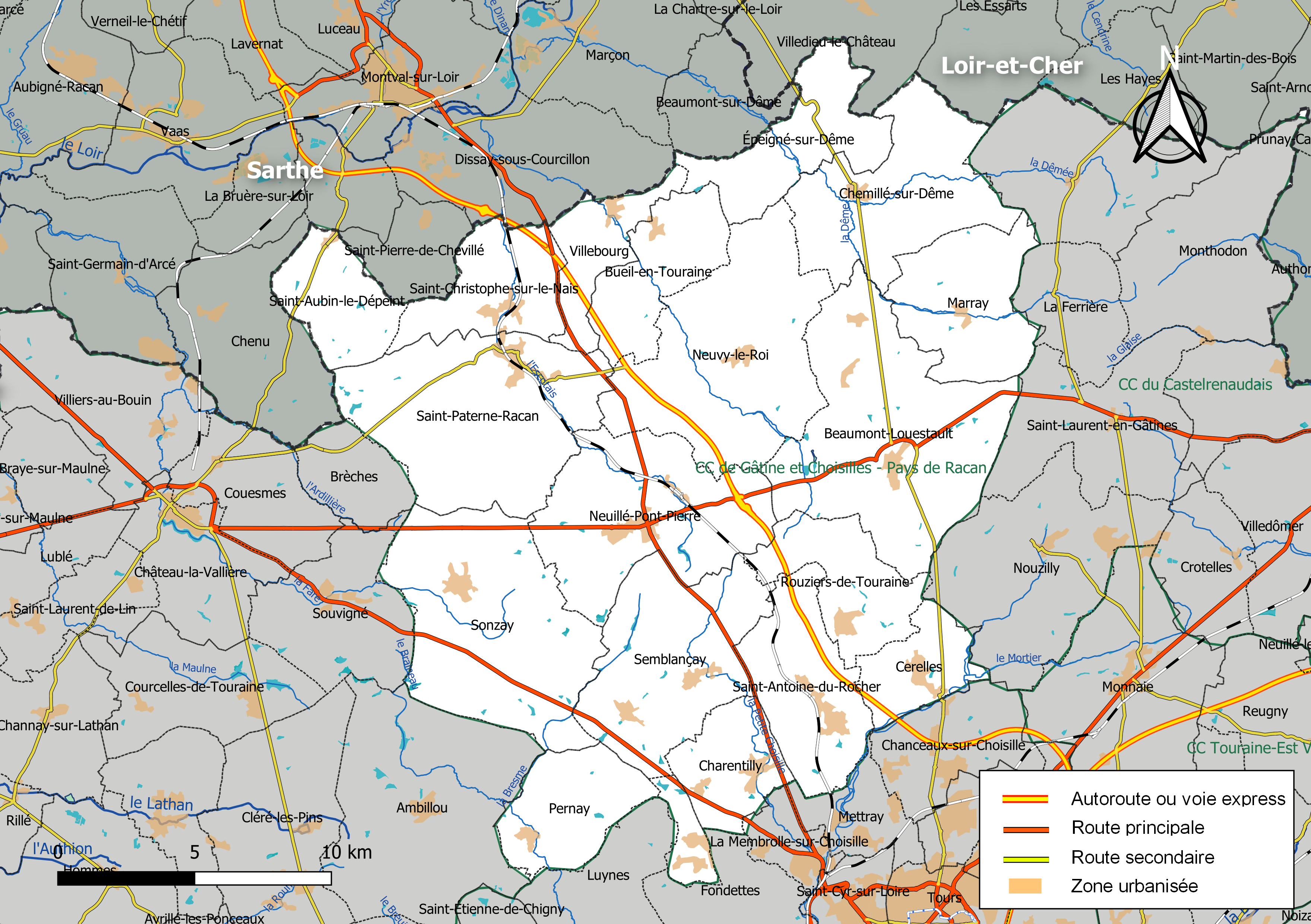 Carte de la communauté de communes de Gâtine et Choisilles - Pays de Racan, département d'Indre-et-Loire, France. Composition au 1er janvier 2019.